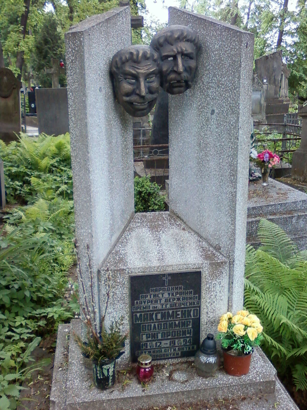 Надгробный памятник Владимира Григорьевича Максименко (1912-1994) — украинского советского актëра, народного артиста Украинской ССР. Лауреата Национальной премии Украины имени Тараса Шевченко.